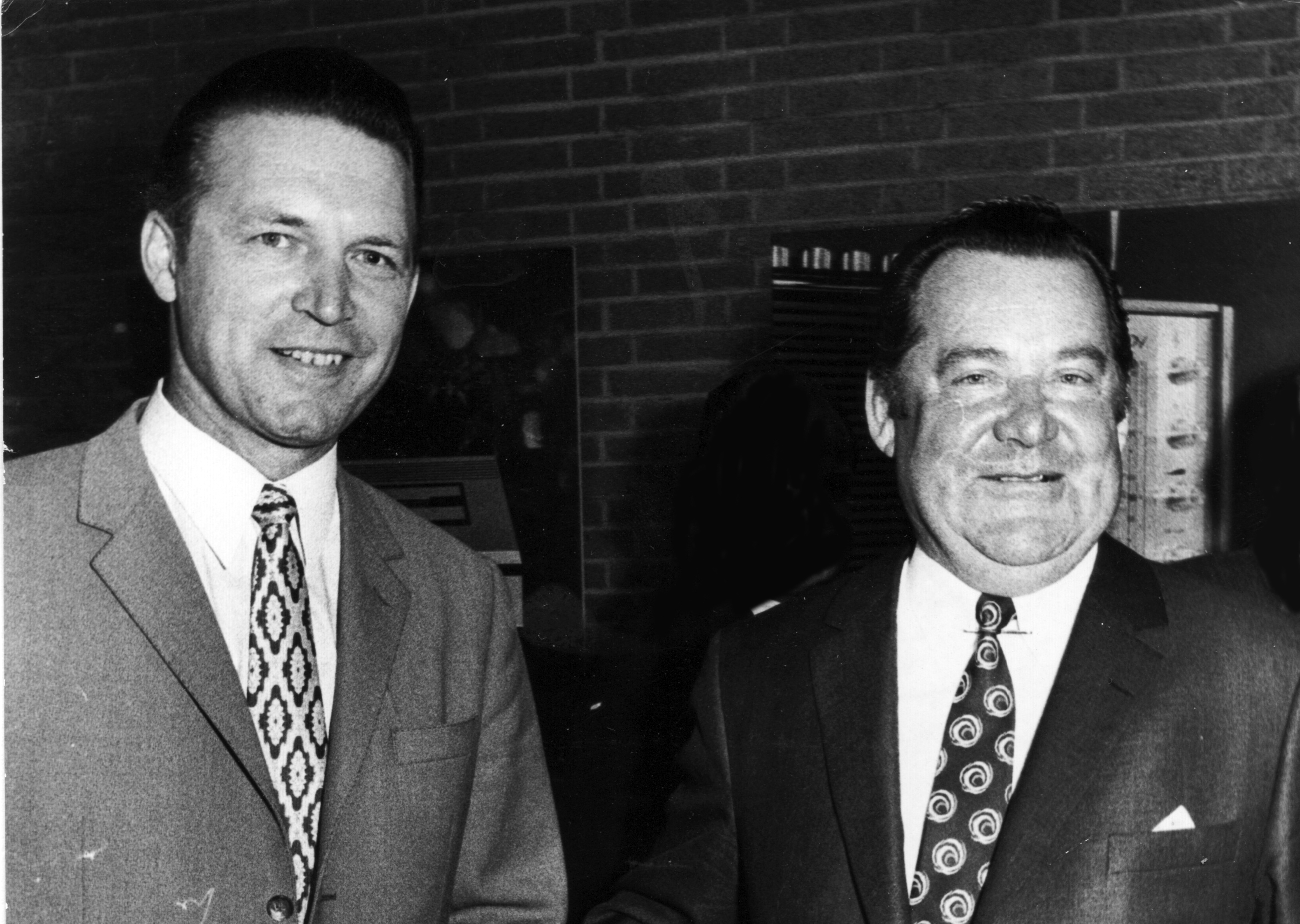 Walter Mayer und Max Grundig bei der Einweihung von Werk 16 in Nürnberg/Langwasser